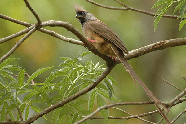 Uganda Speckled Mousebird (Colius striatus) Buhoma, Bwindi NP Jan 2006